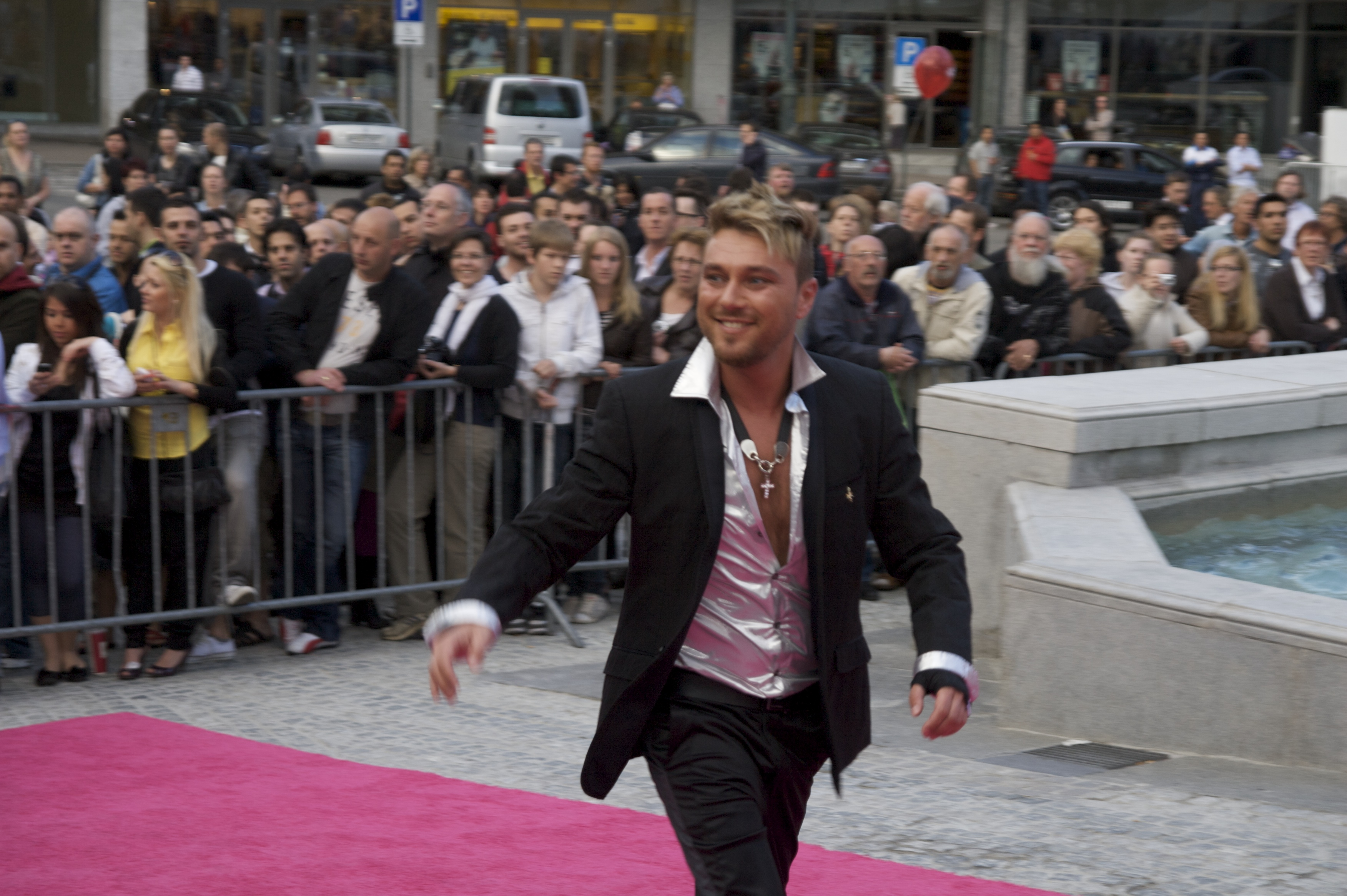 Foto: Vincent Hasselgård, Aktiv I Oslo.no